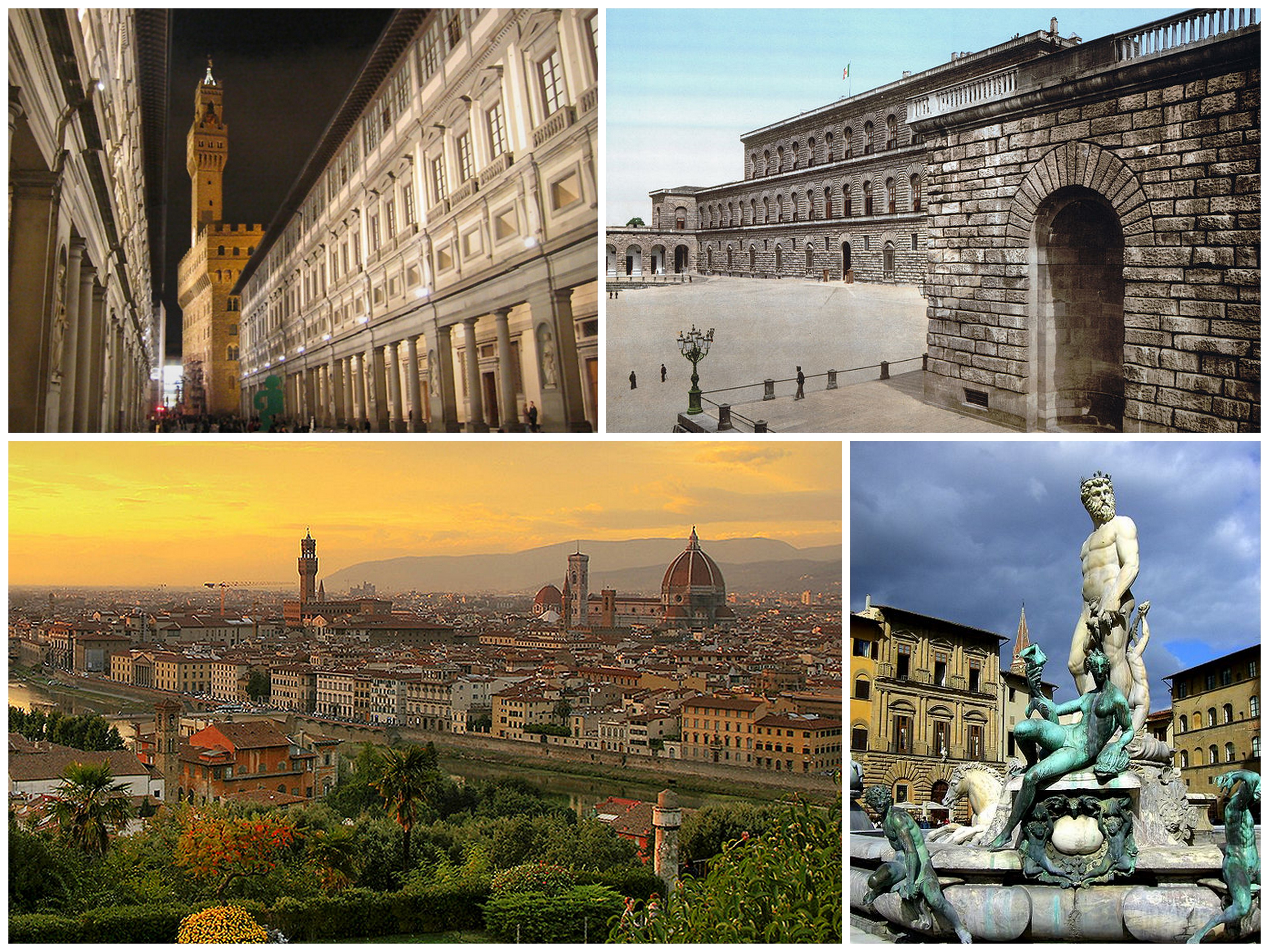 Collage di varie foto di Firenze